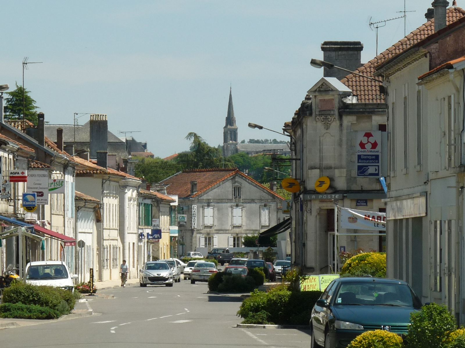 rue principale de St-Aigulin (Charente-Maritime, France); au loin le clocher de l'église de La Roche-Chalais (Dordogne).